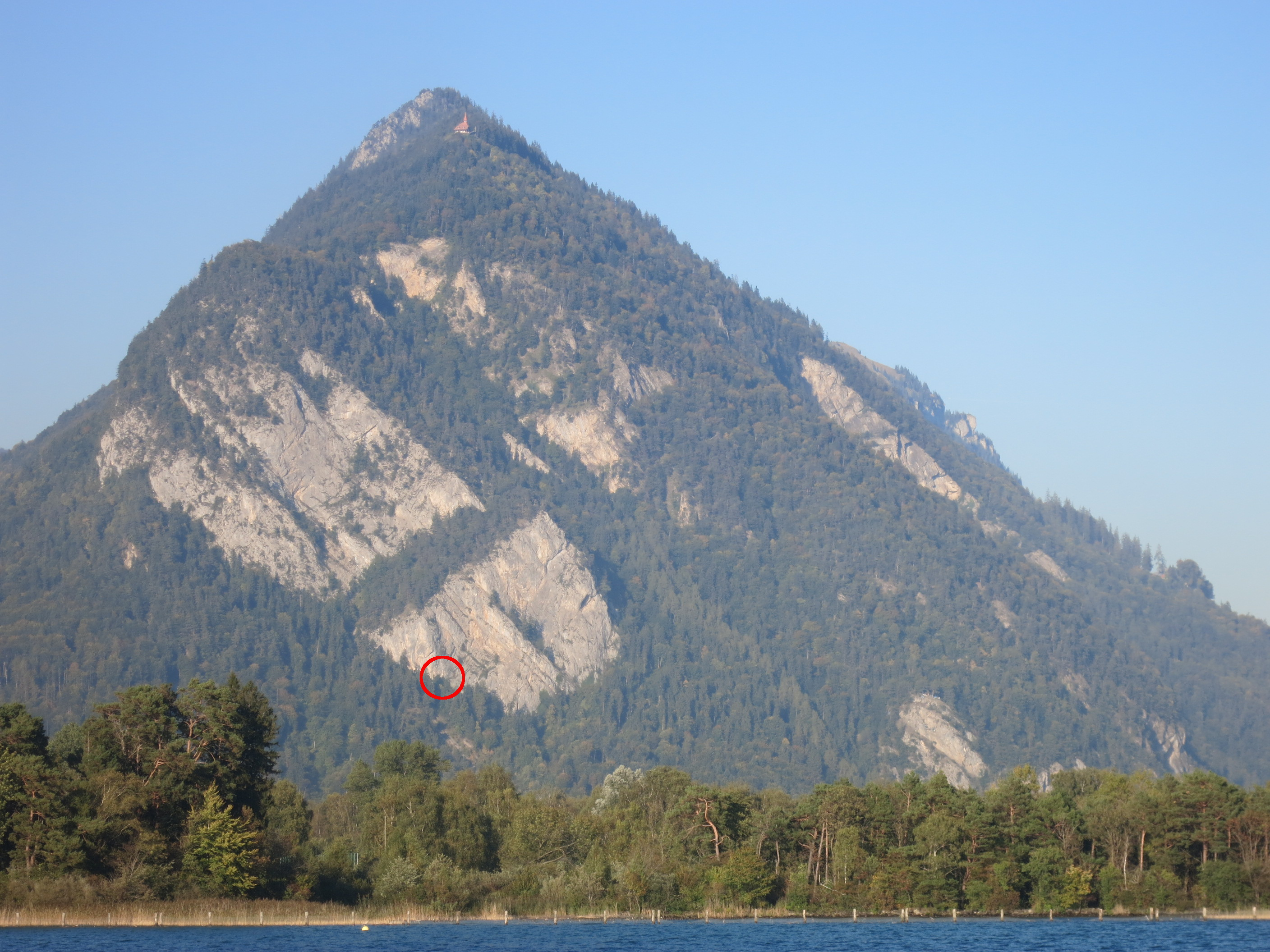 Artilleriewerk Kammfluh, Interlaken BE, Schweiz